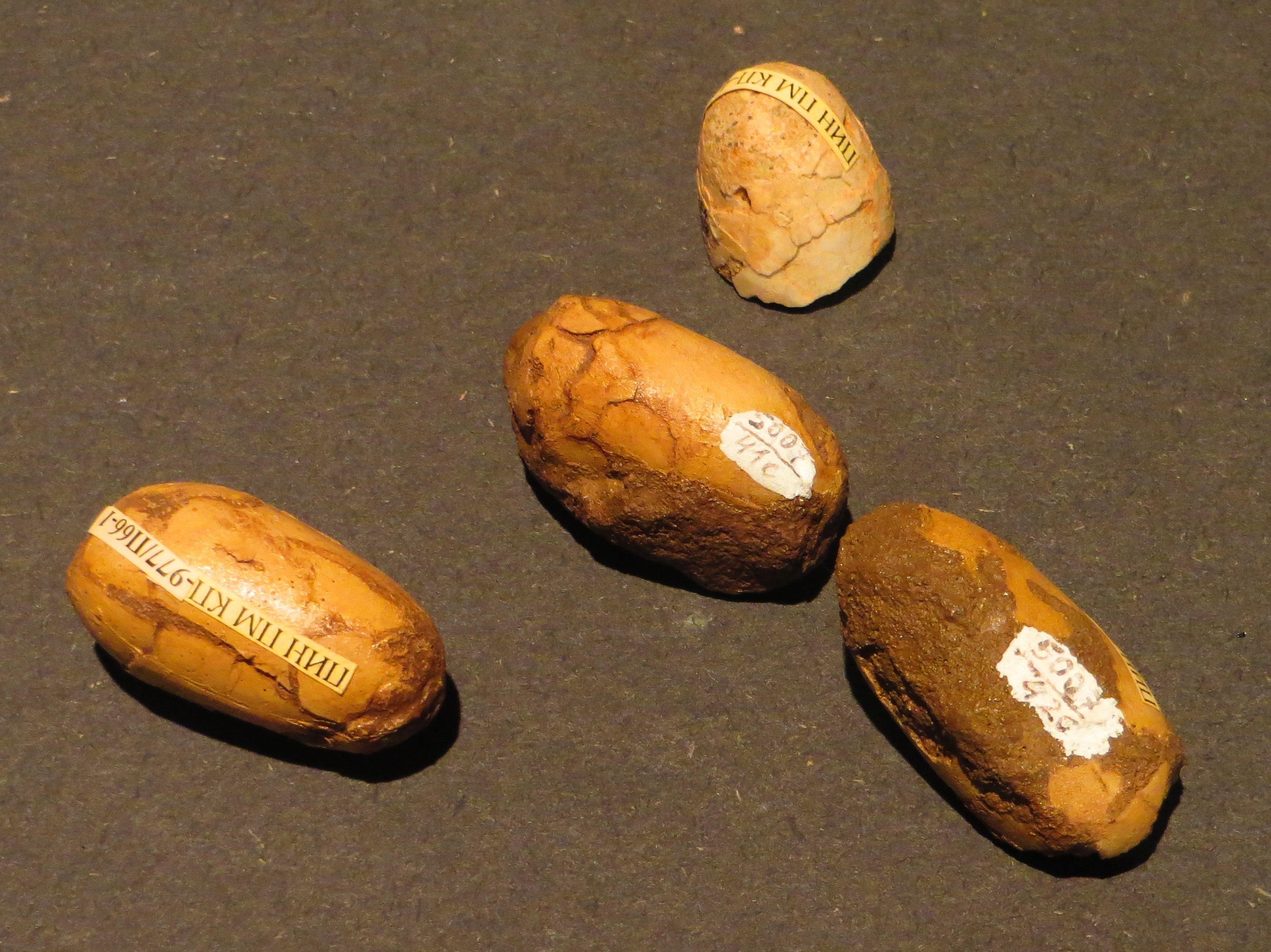 Fossil of Gobipteryx, an extinct bird- Took the picture at Dinosaurium, Prague